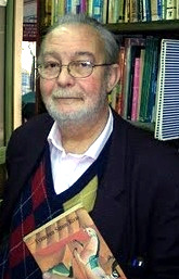 Francisco Rivas, escritor chileno